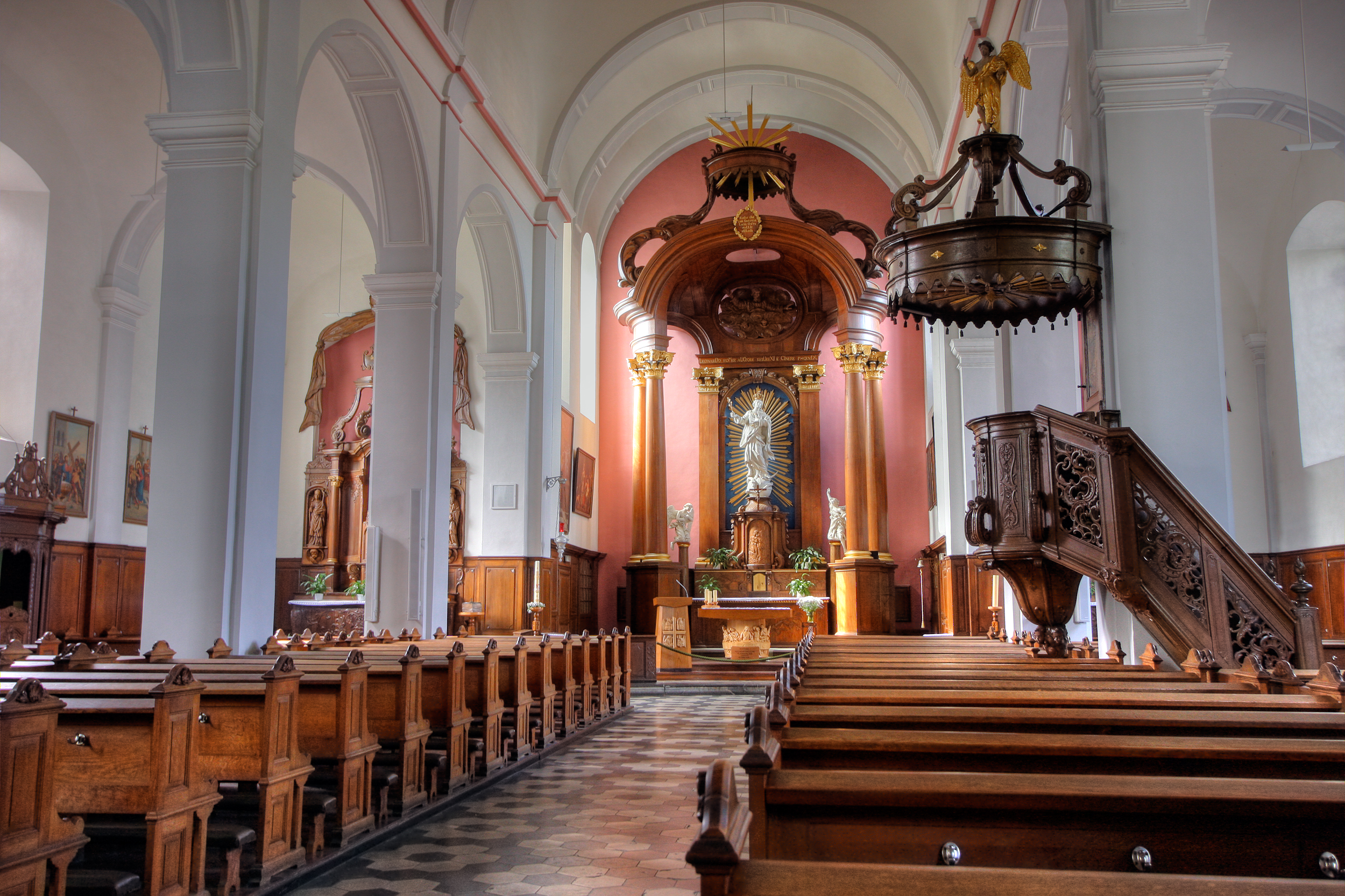 Kapuzinerkirche in Eupen, Innenansicht Richtung Altar um 1780. Ursprüngliche Planung Joseph Moretti